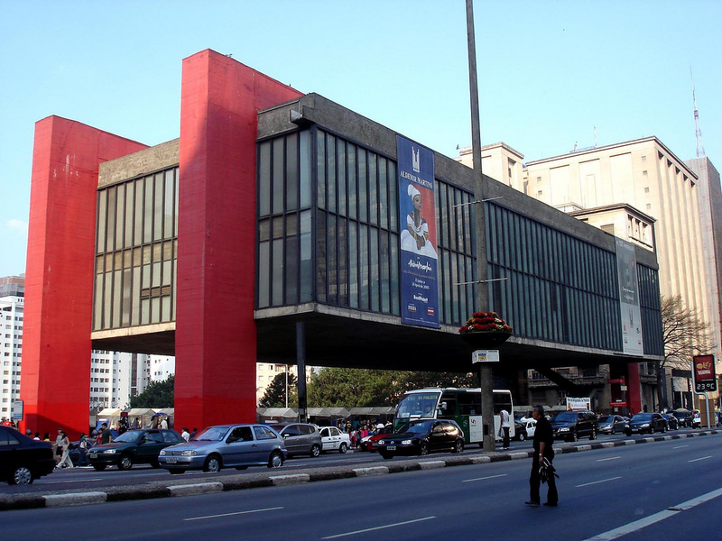 Museu de Arte de São Paulo